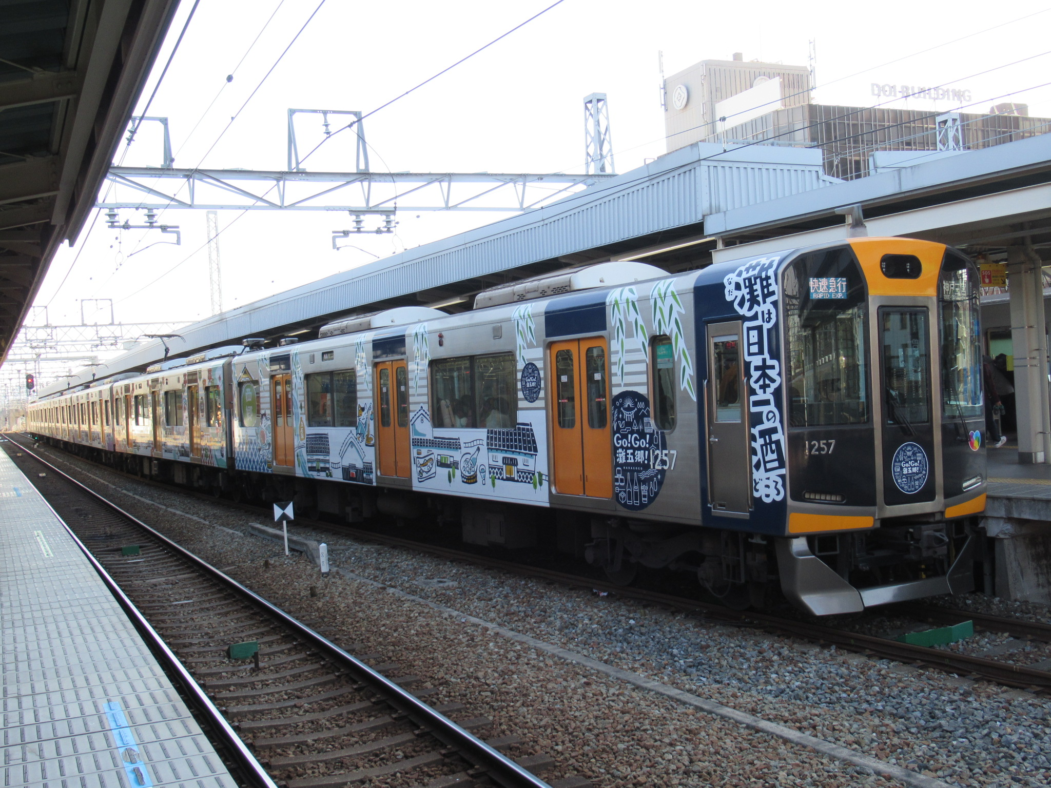 阪神1000系 「Go!Go!灘五郷!」ラッピング電車